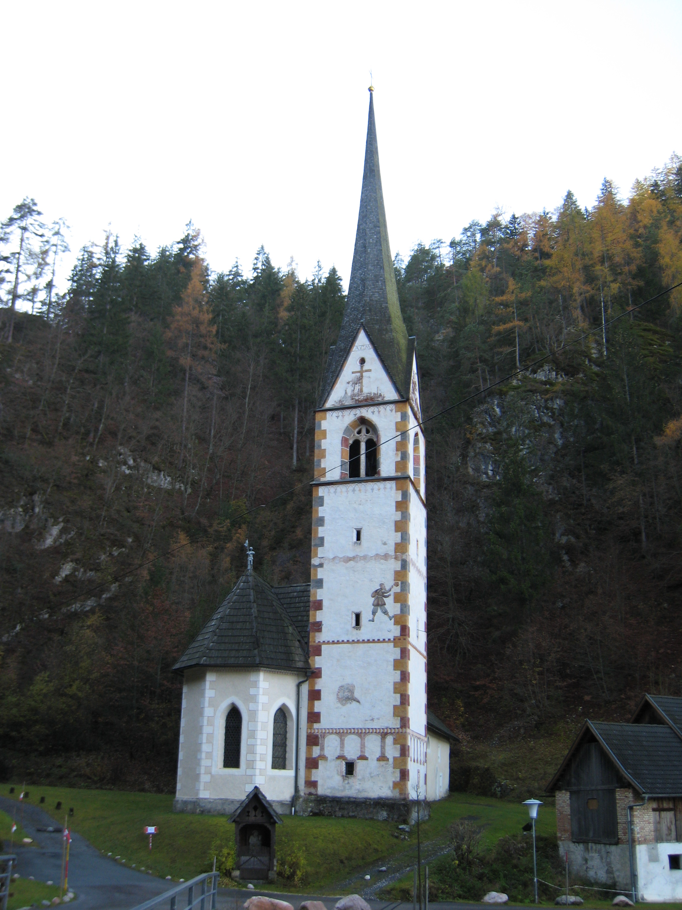 Filial- und Wallfahrtskirche Unsere Liebe Frau im Graben, Vorderberg, Kärnten